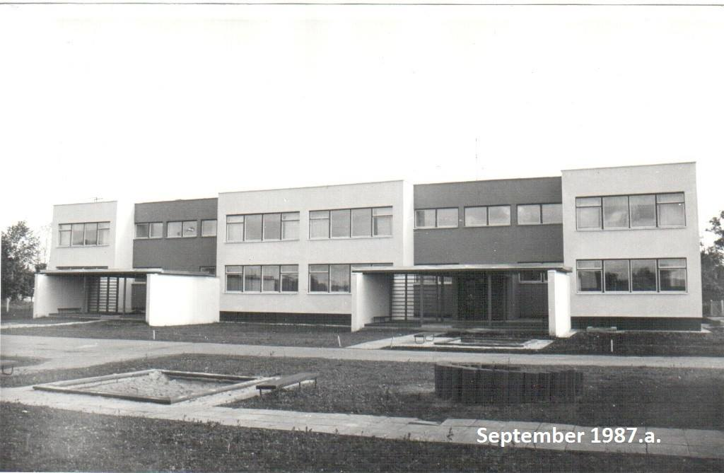 Lehola Lasteaed-algkool